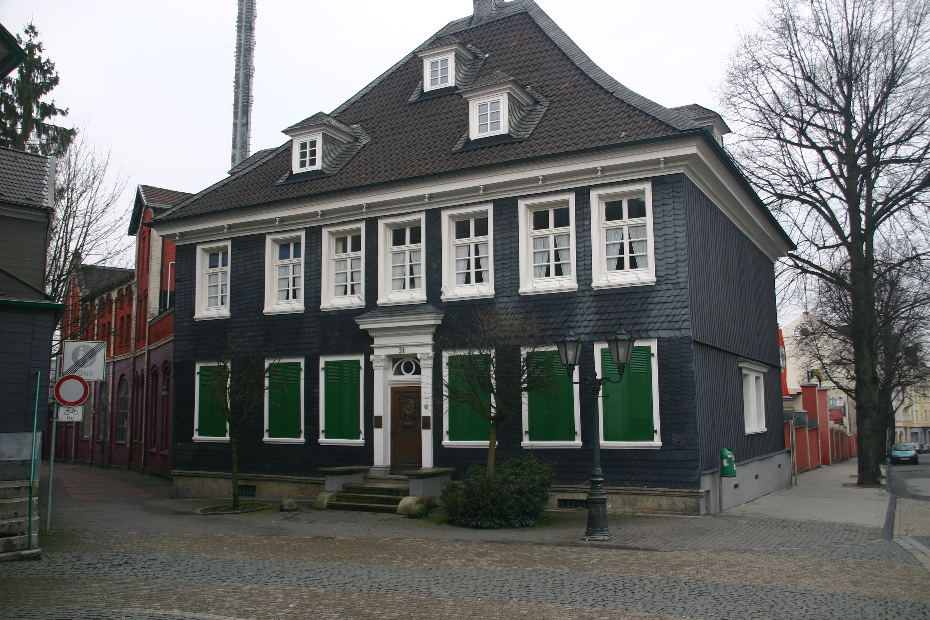 Historisches Verwaltungsgebäude der Schwelmer Brauerei, Untermauerstraße 31